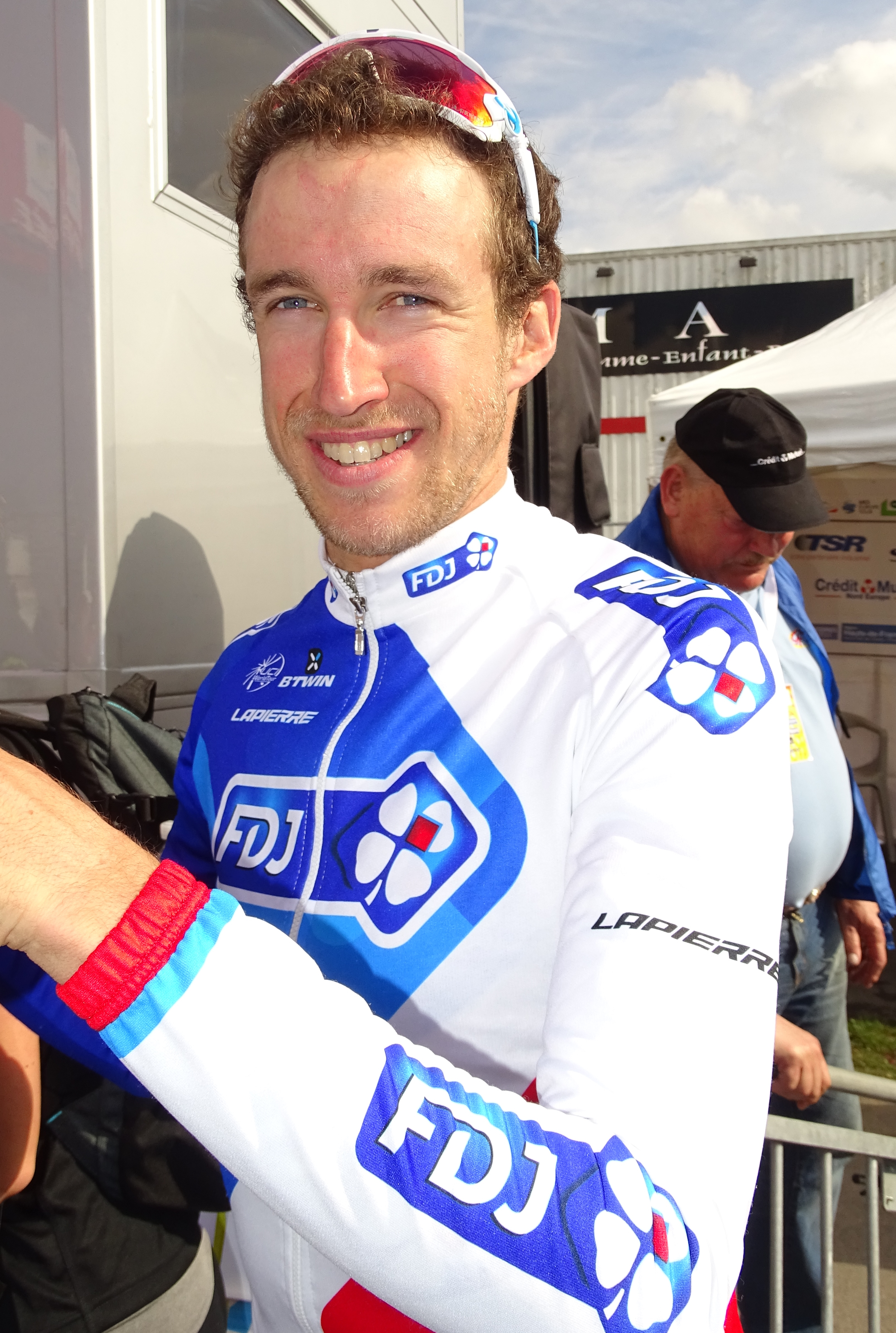 Reportage réalisé le jeudi 14 avril à l'occasion du départ et de l'arrivée du Grand Prix de Denain 2016 à Denain, Nord, Nord-Pas-de-Calais-Picardie, France.